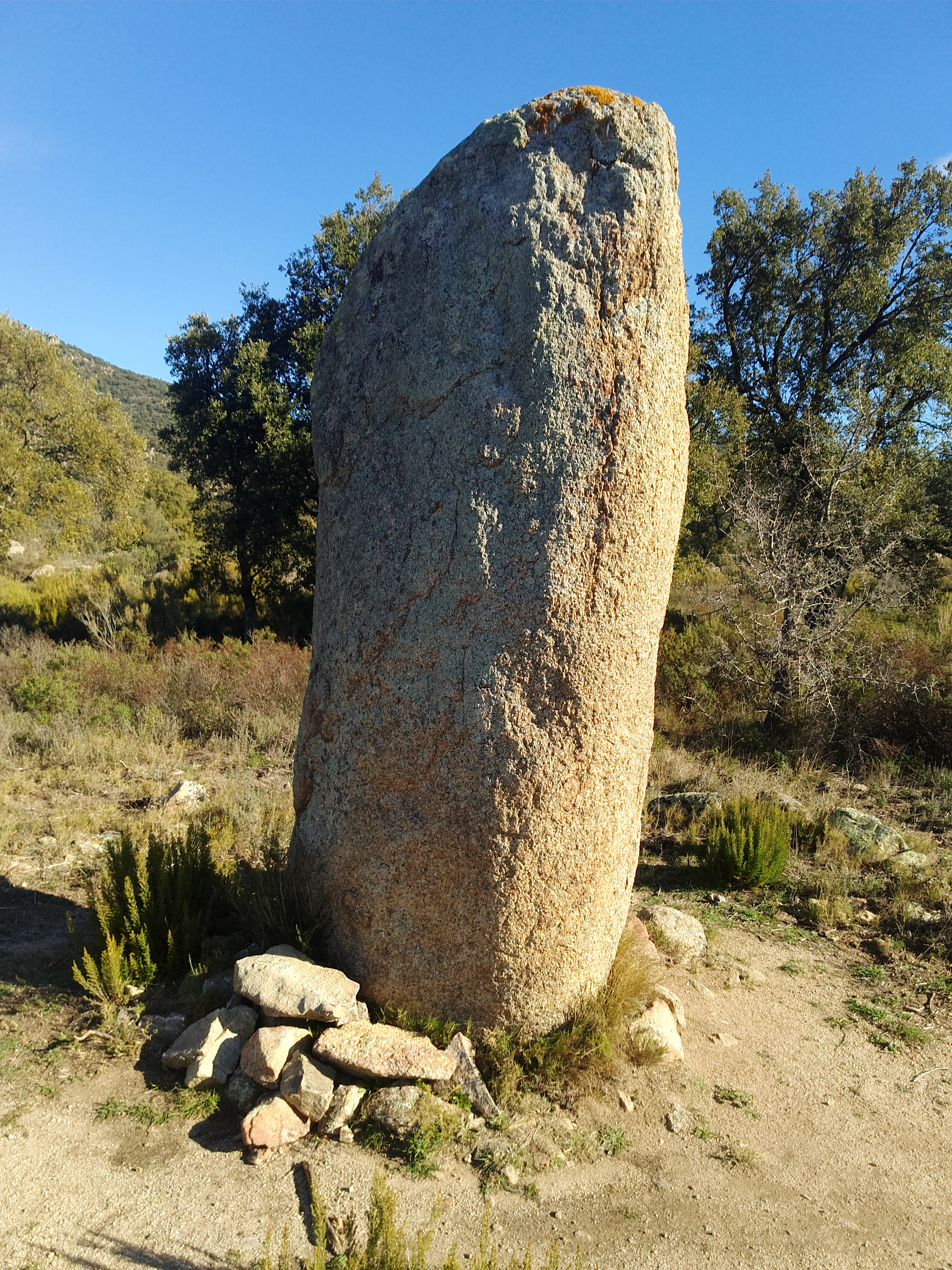 L'Albera This is a photography of a Special Area of Conservation in Spain with the ID: ES5120014. Natura2000 entry, EEA entry